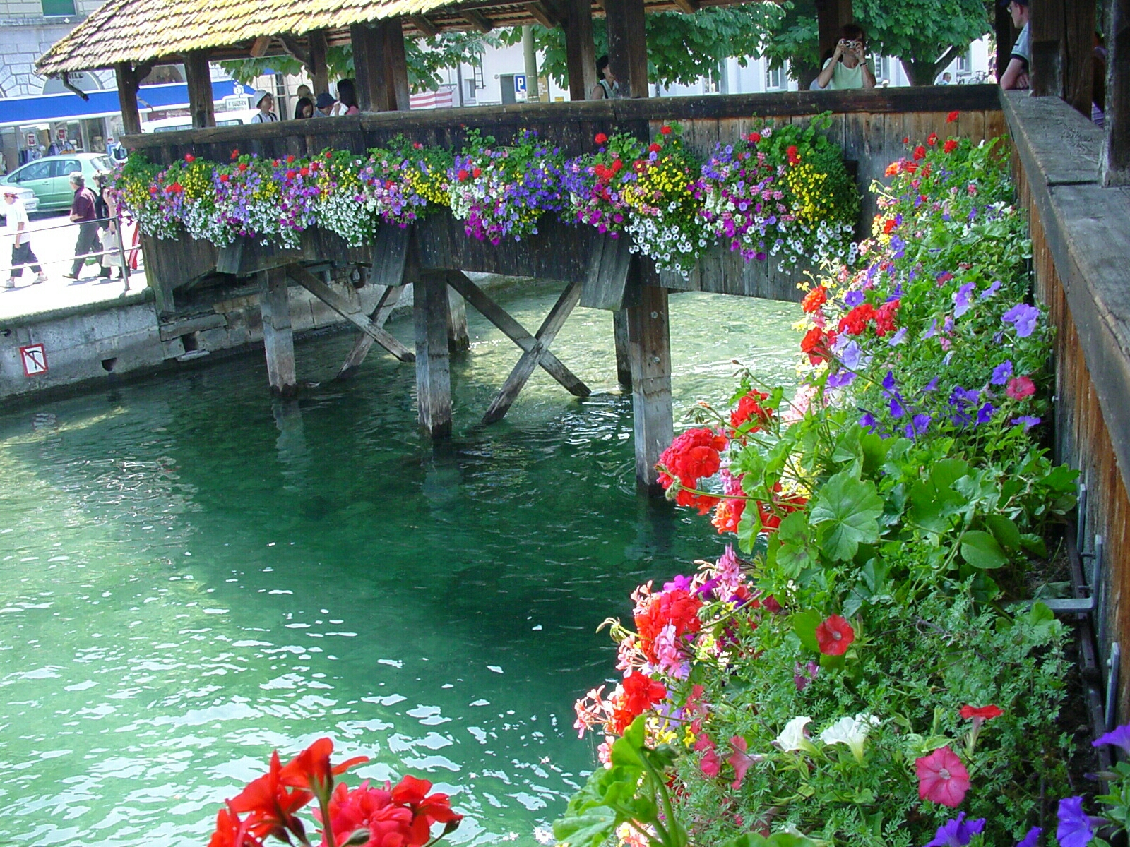 Luzern Holzbrücke